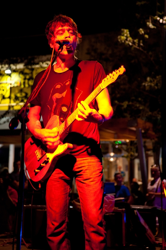 Davor Gobac i Psihomodo pop